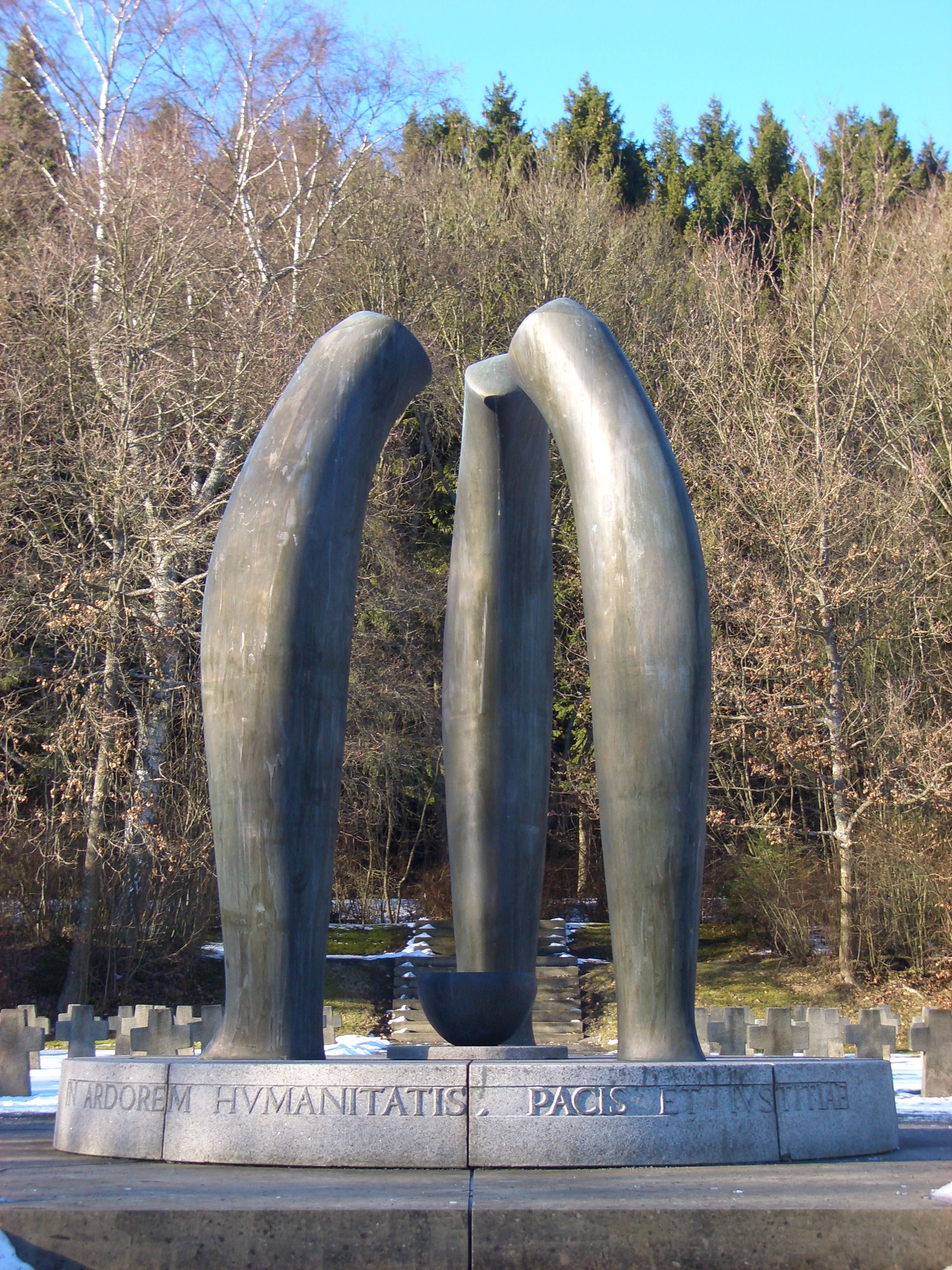 SS-Sonderlager/KZ Hinzert, memorial